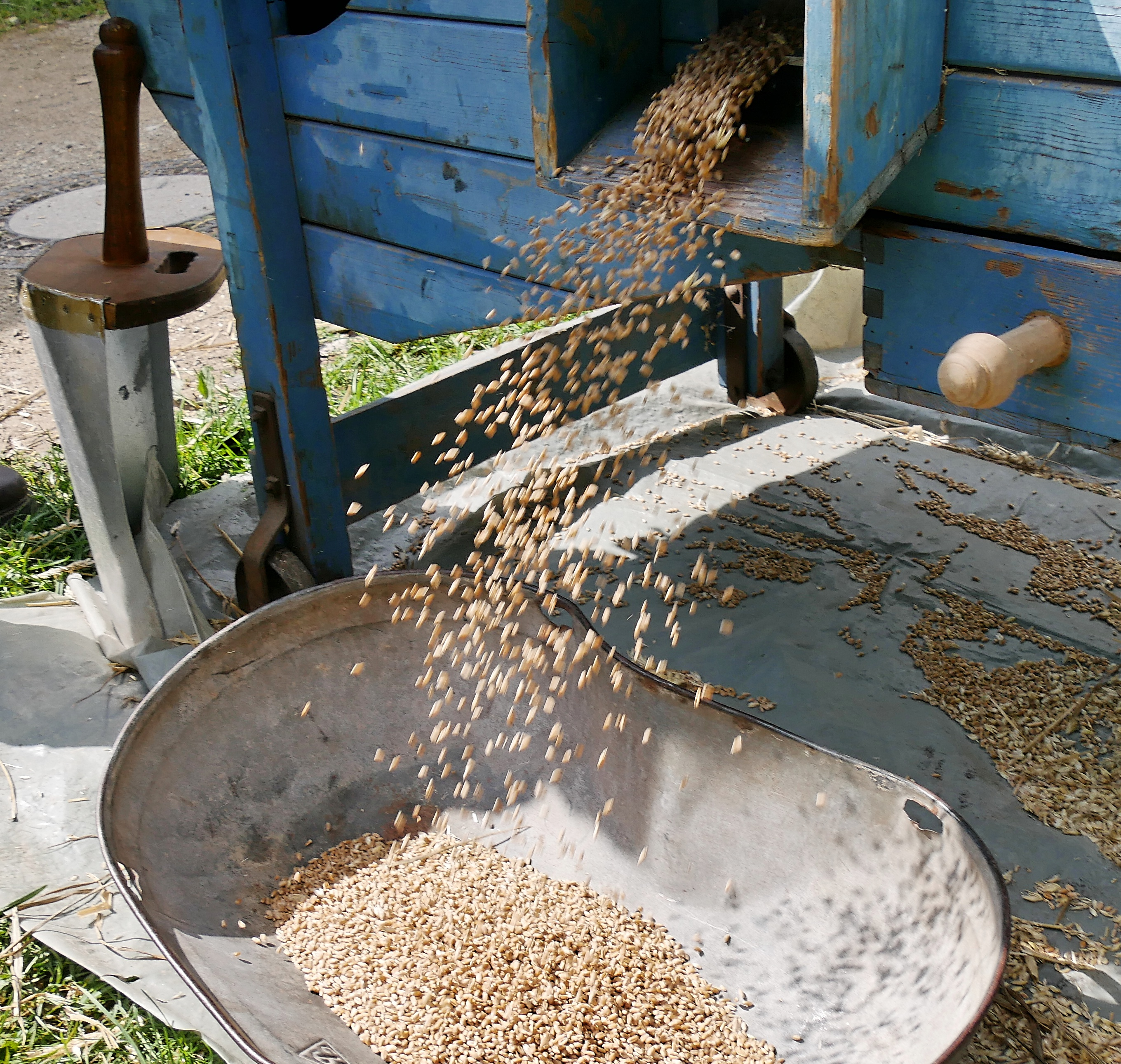 Roscheider Hof - Farmer´s Day - WIndfege